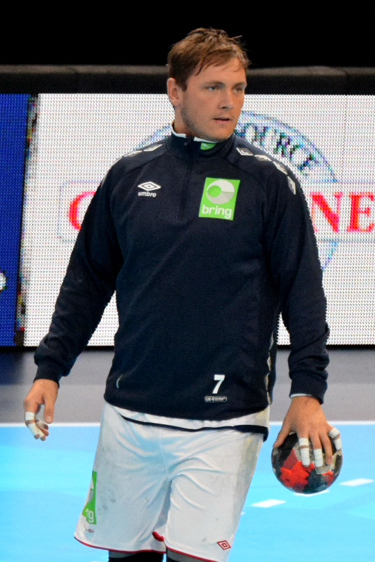 Le 10 janvier 2016 lors du match Norvège / Qatar durant la Golden League à l'AccordHotel Arena (Paris). Joakim Hykkerud